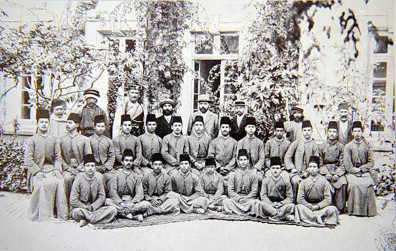 Учащиеся мужской учительской семинарии в Назарете. 1907 г.